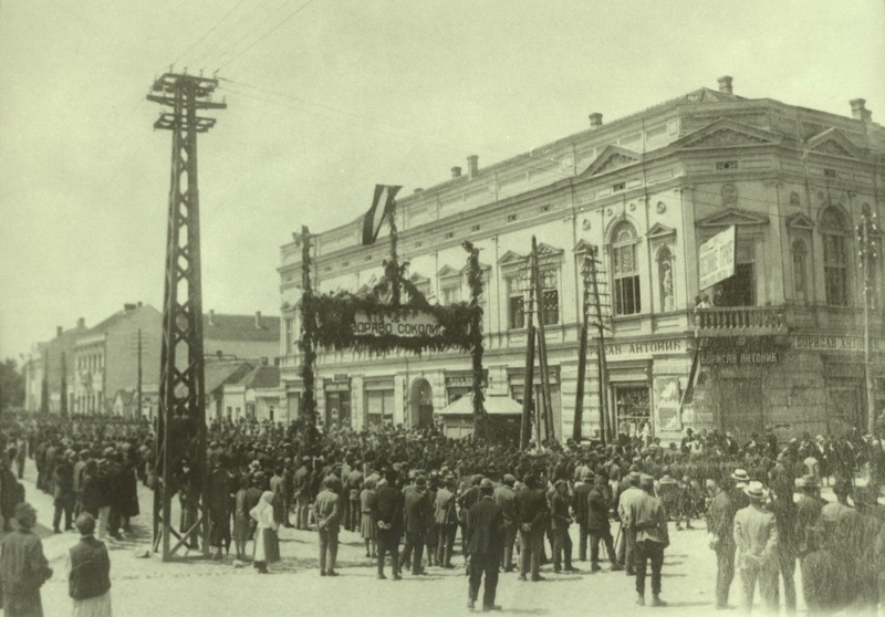 Srpski (latinica): Doček Sokola u Šapcu, XX vek